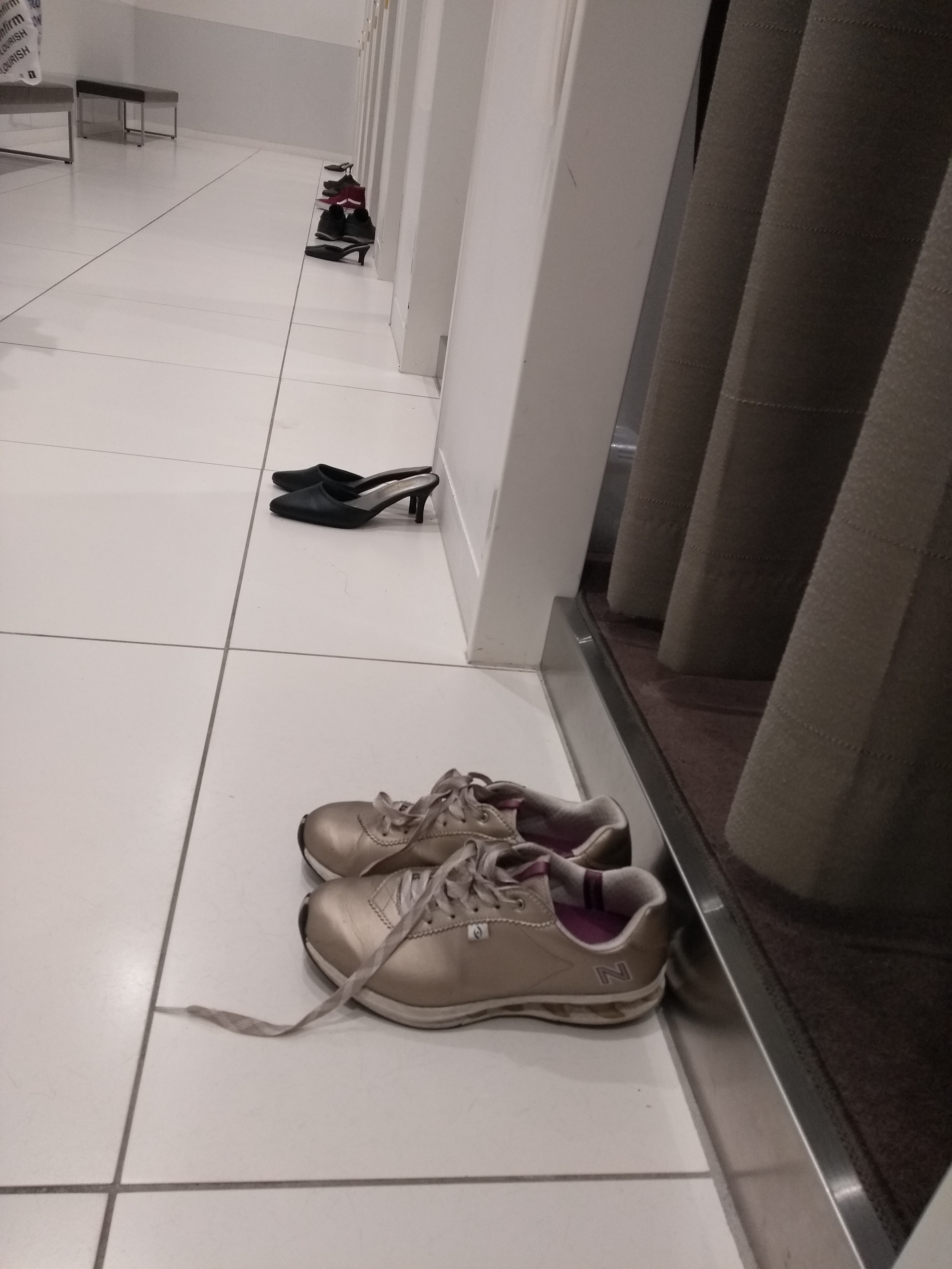 IMG_20180717_151824624